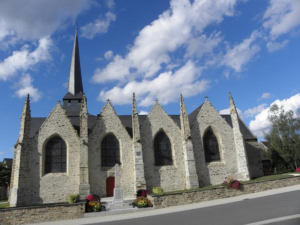 Flanc sud de l'église de Moutiers (35)